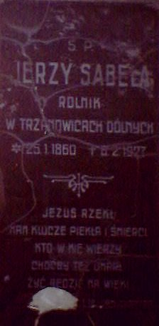 Náhrobní nápis J. Sabely